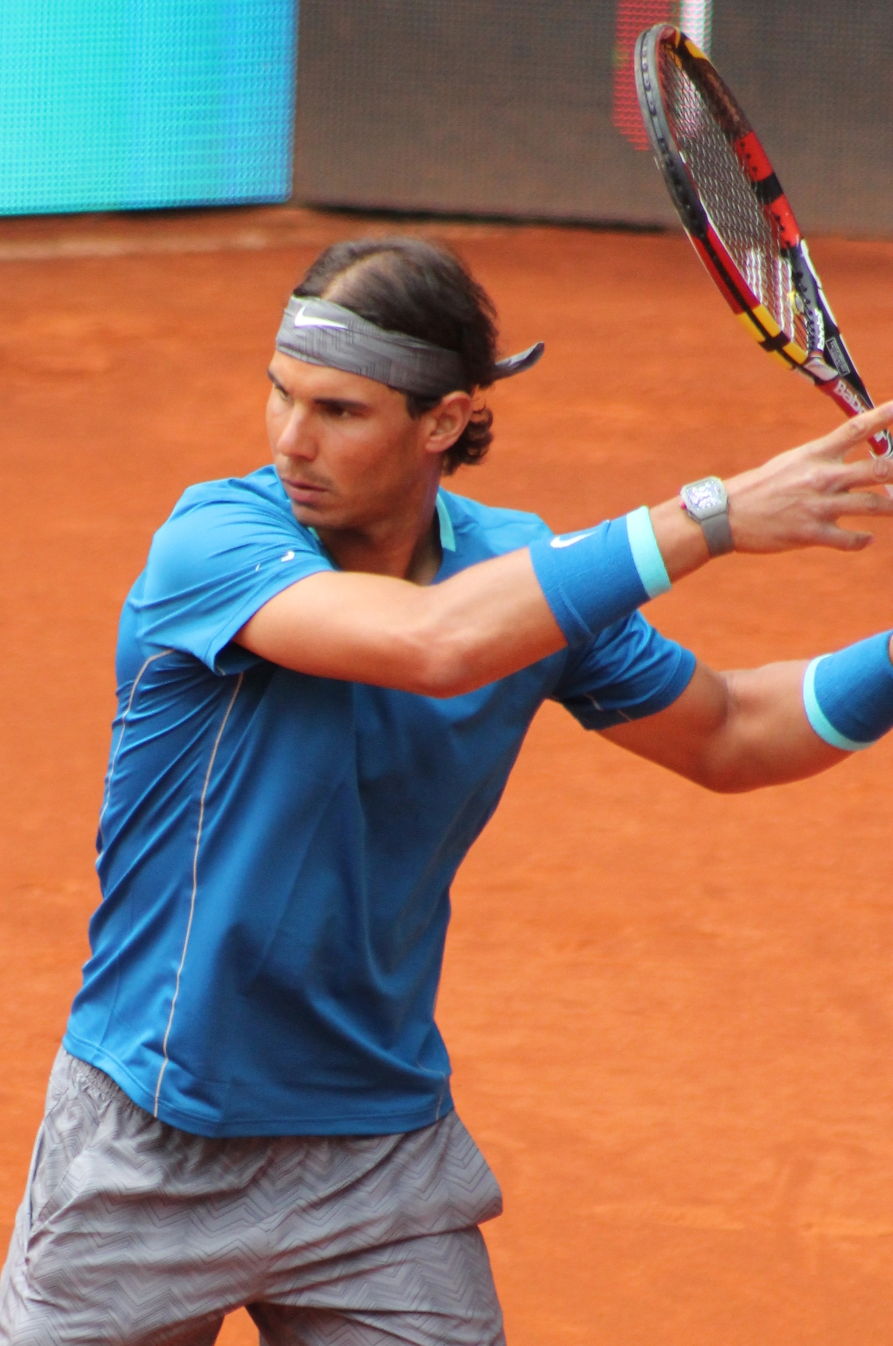 Nadal MA14 (4) - Copy